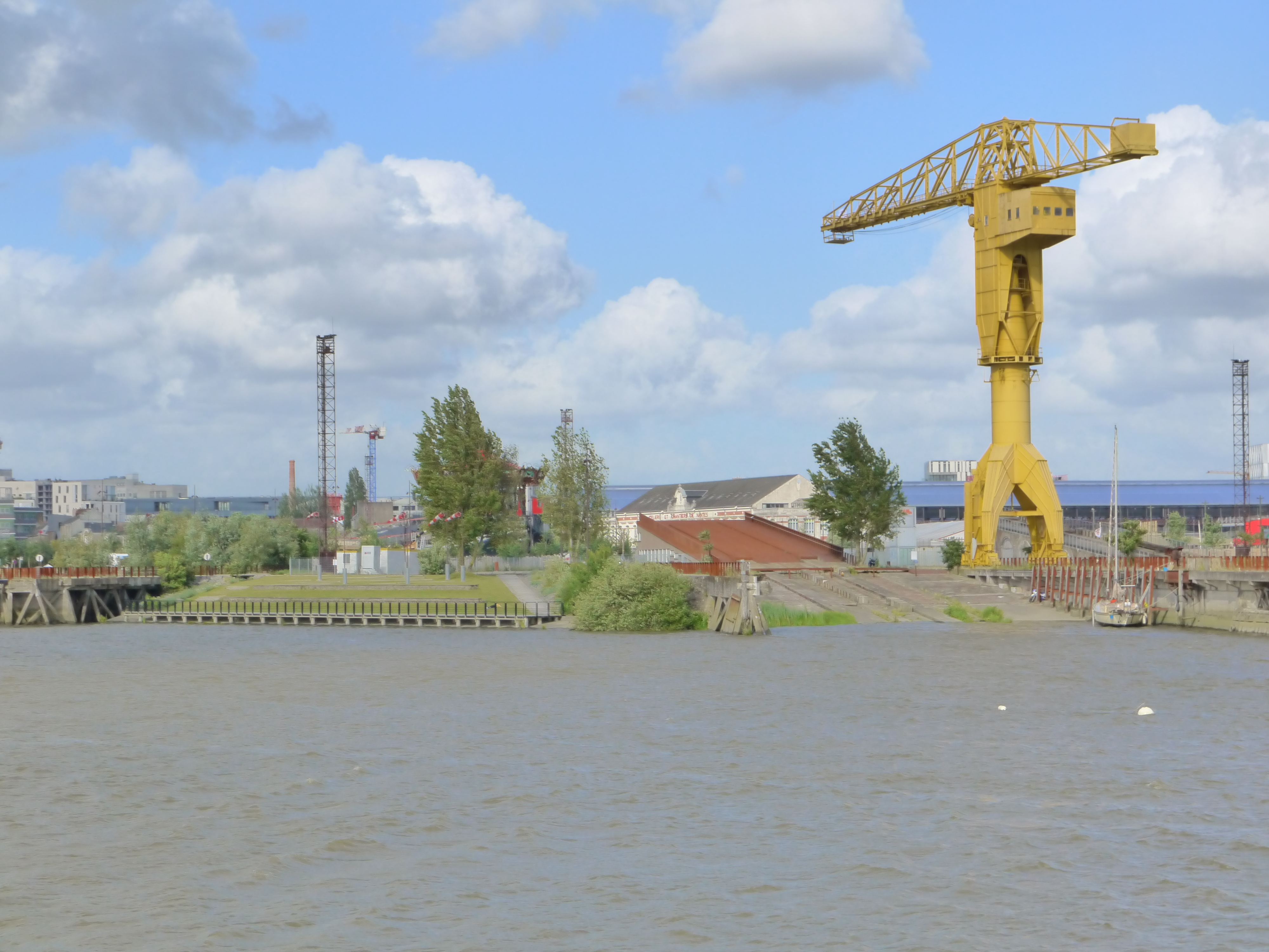 La grue jaune sur l'île de Nantes, à hauteur des anciens chantiers navals Dubigeon